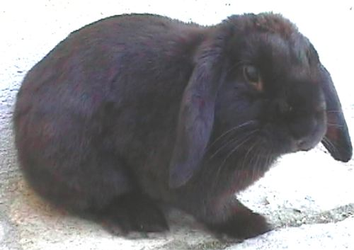 Photo de mon lapin bélier nain, "Pilette". (RexGeet) RexGeet